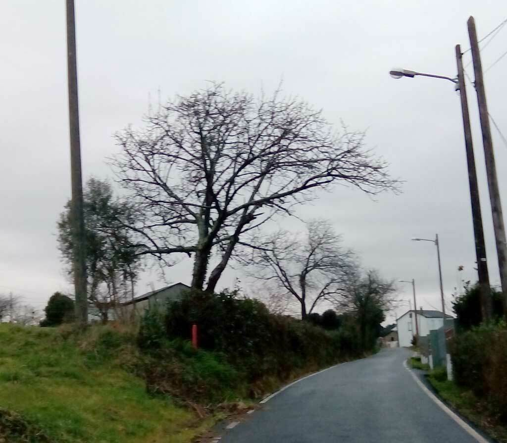 Vista da Braña, Doso, Narón, A Coruña.